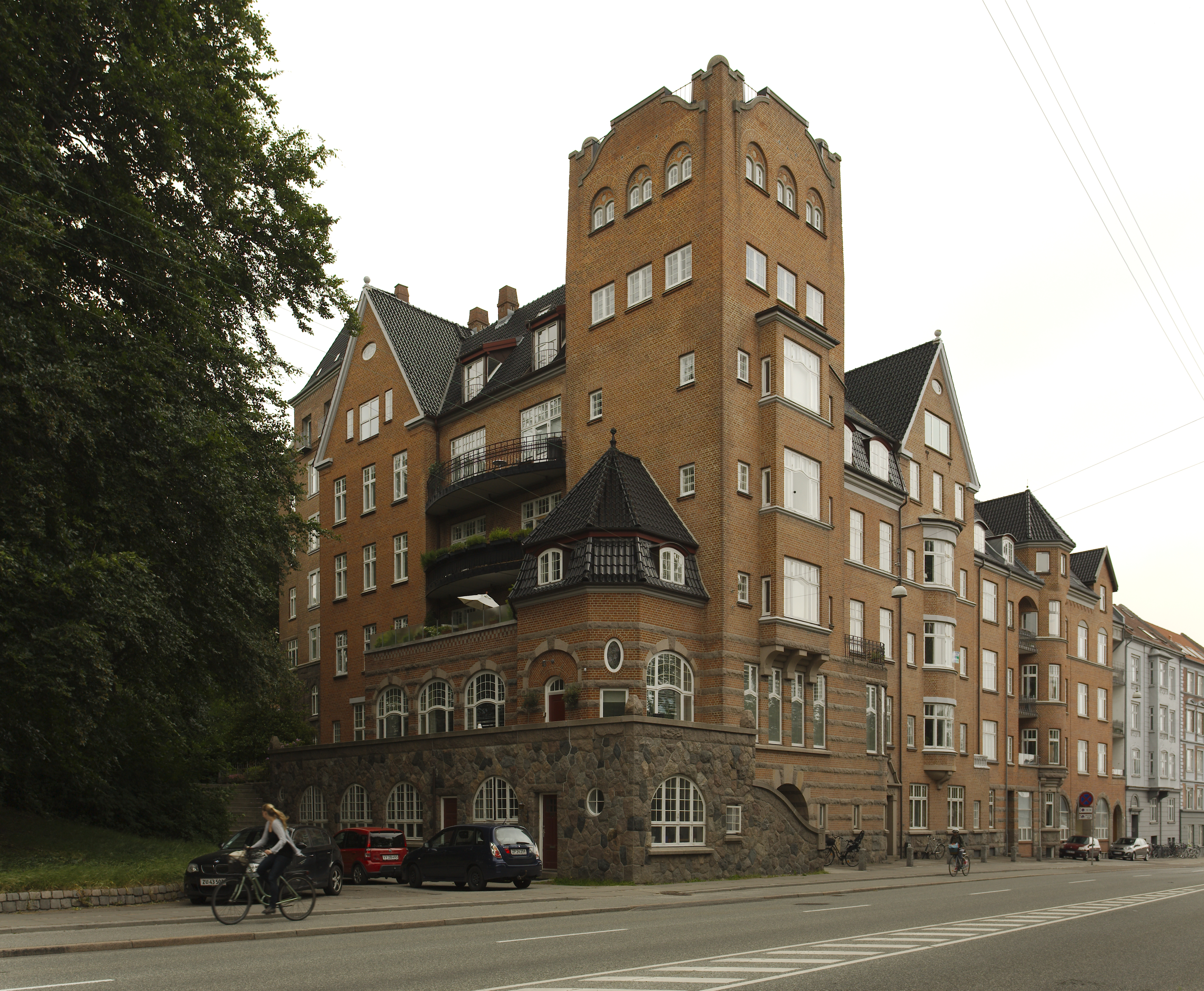 Skansen